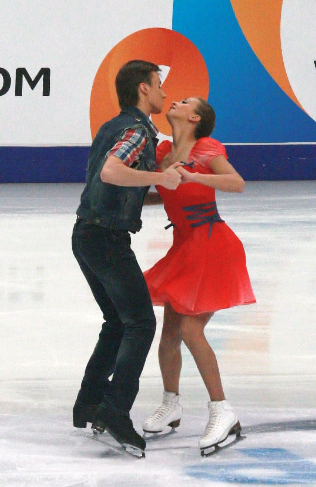 Виктория Синицина и Руслан Жиганшин (Россия) на Кубке Ростелекома 2012. Короткая программа.